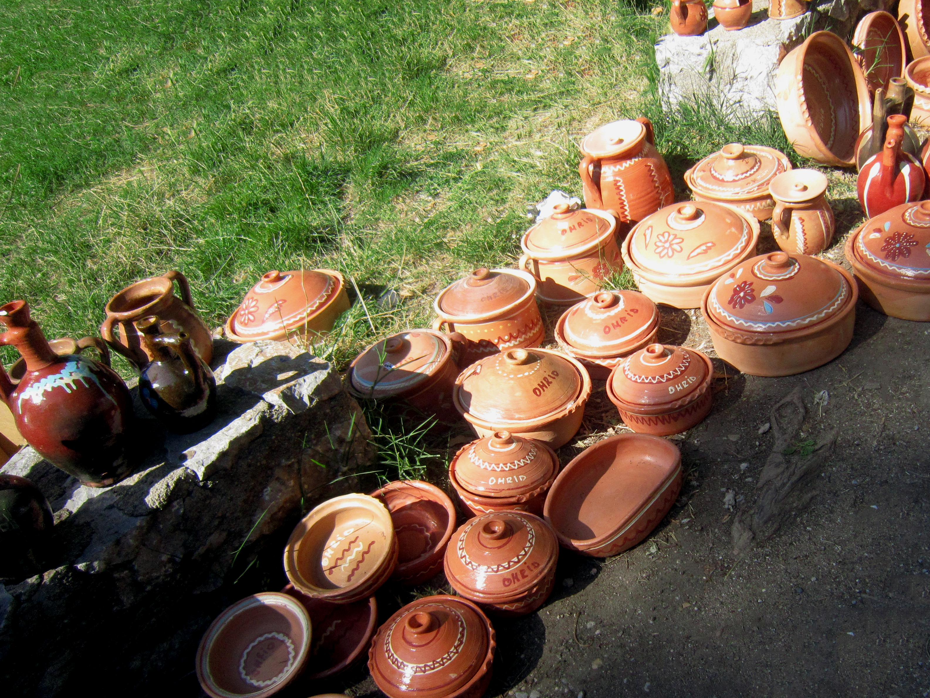 Opinci